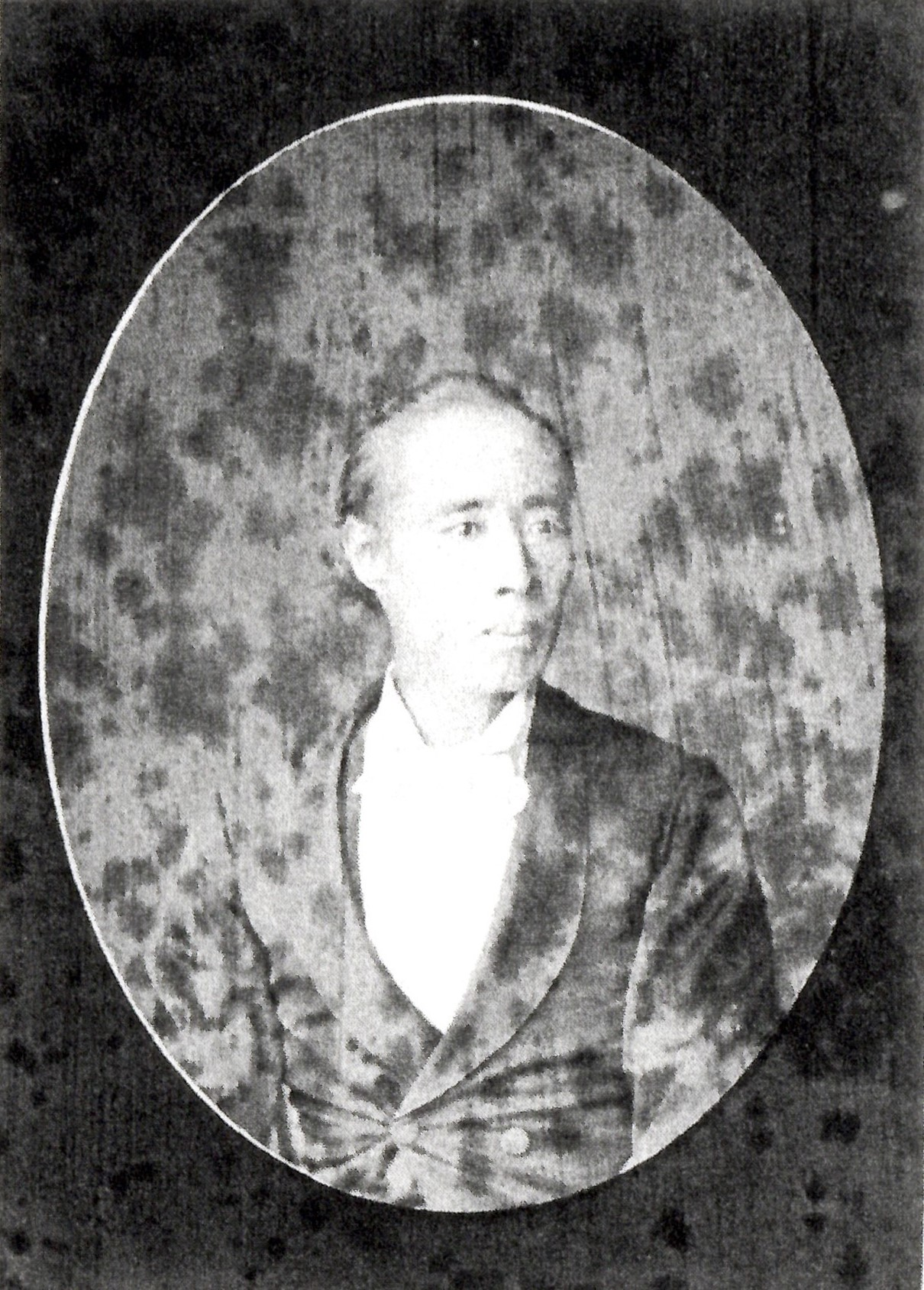 小笠原貞正の肖像写真。